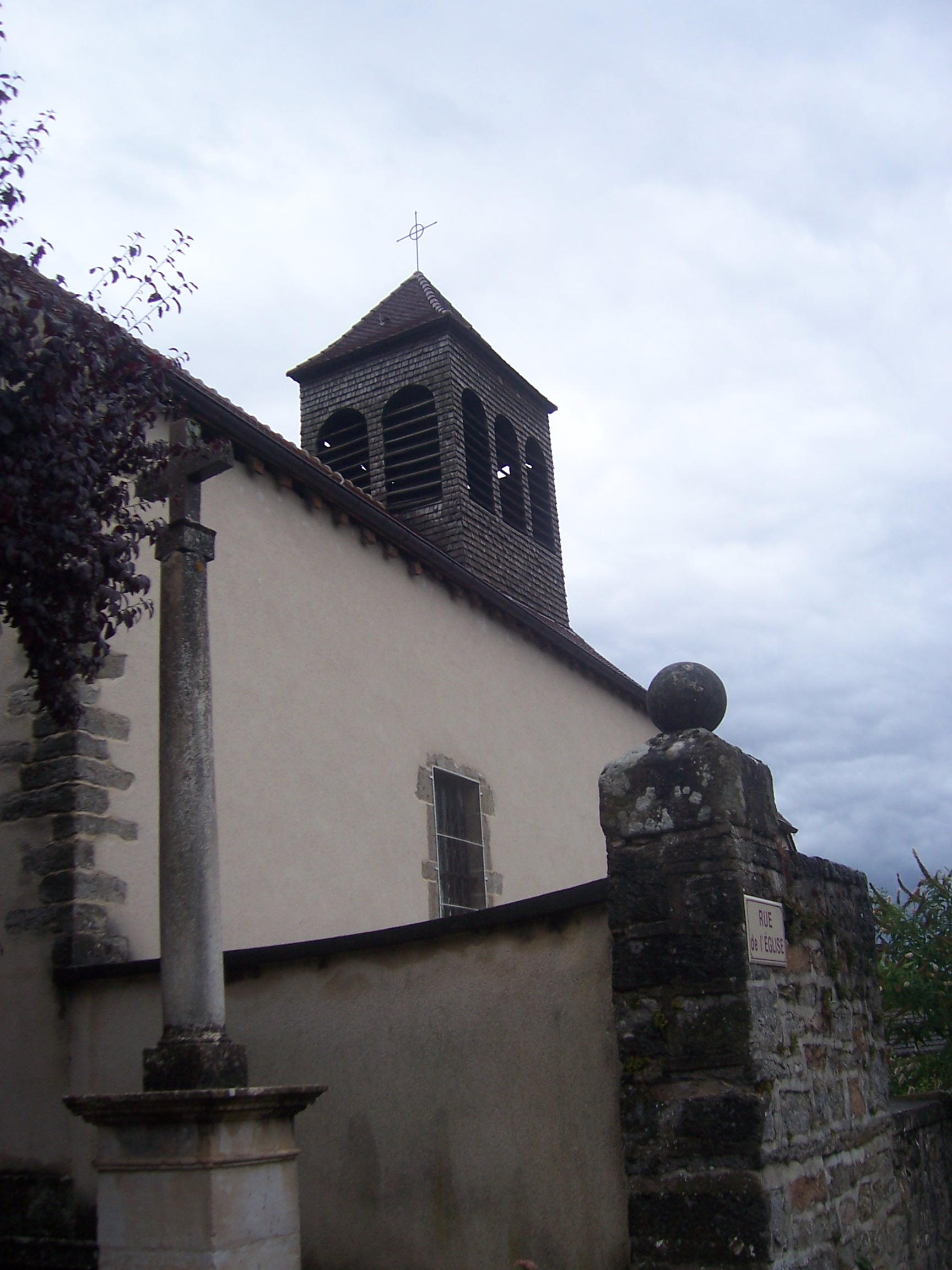 Eglise de Sampigny-lès-Maranges